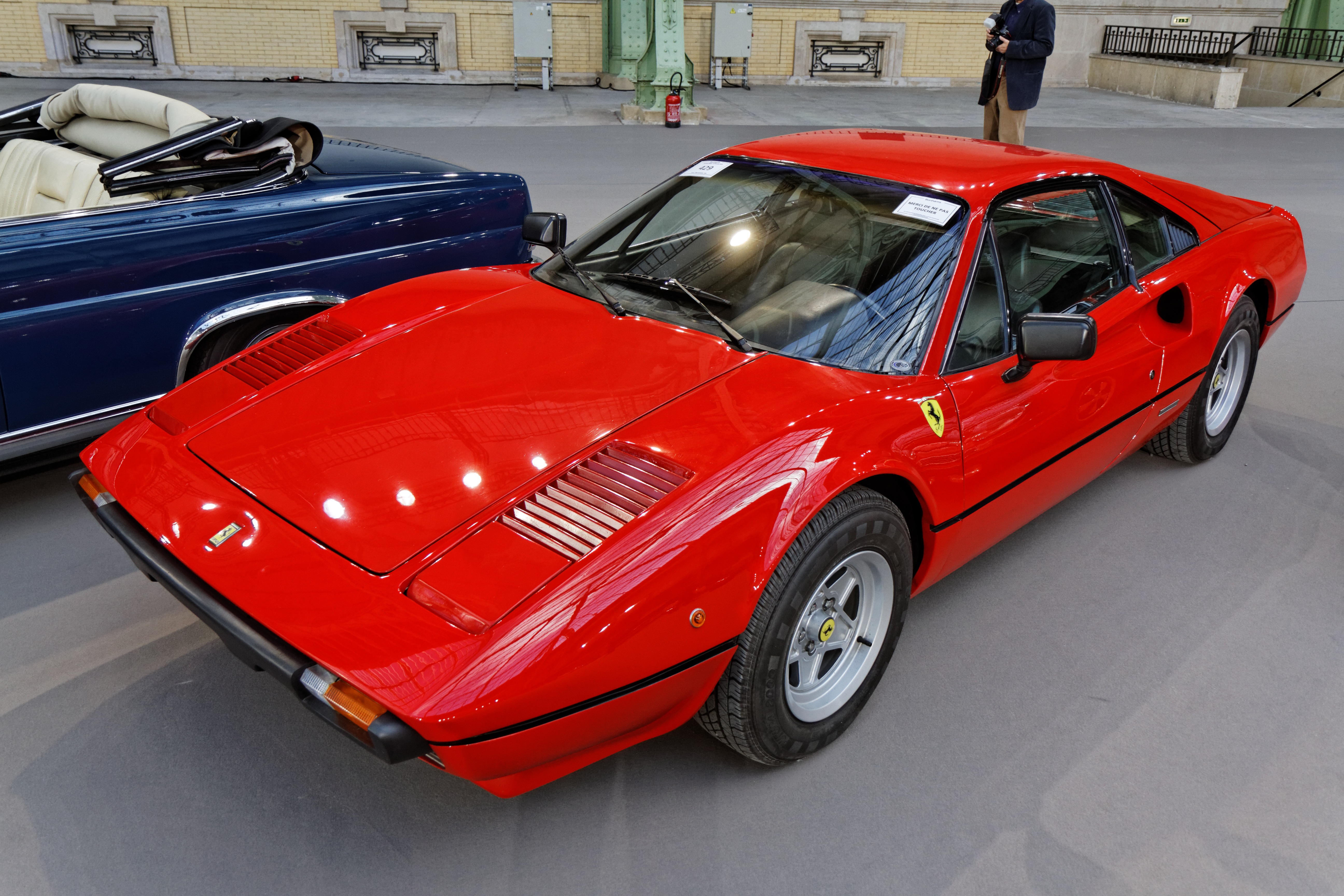 Une Ferrari 308 GT Berlinetta au Grand Palais lors de la vente Bonhams en février 2014.